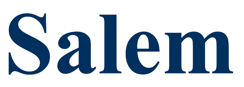 Wortmarke der Schule Schloss Salem